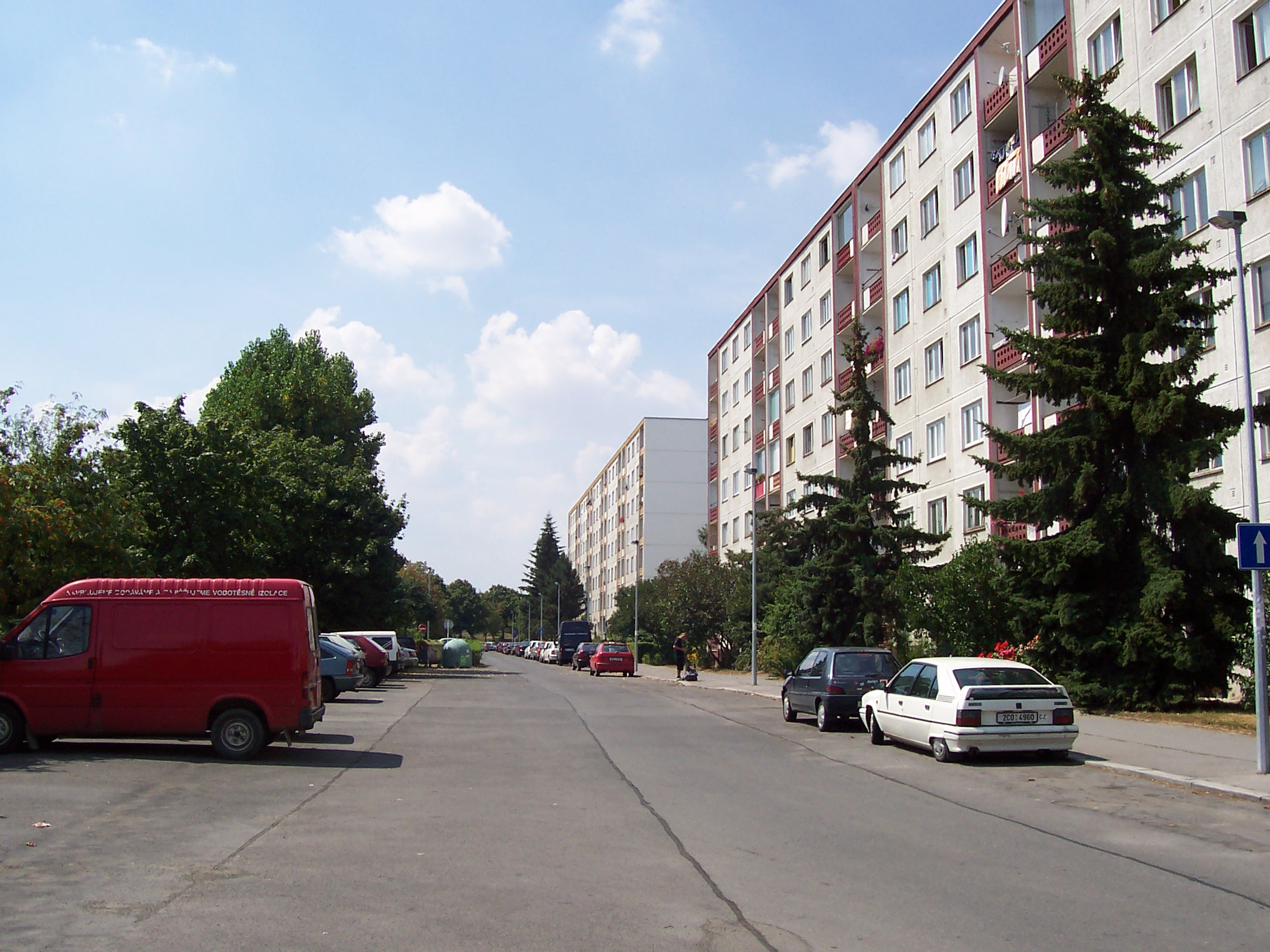 Praha Vokovice, Sídliště Červený vrch